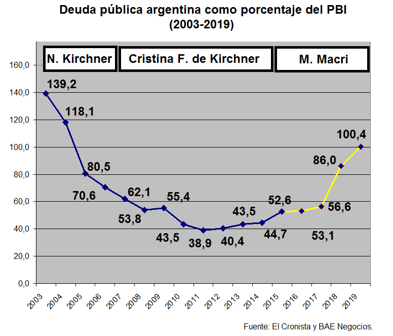 Argentina. Deuda Pública como porcentaje del PBI. 2003-2019. Fuente: "Por la devaluación la deuda pública ya superó el 100% del PBI", Mariano Cuparo Ortiz, Gráfico de S. Gianandrea/BAE Negocios, 14/08/2019, BAE Negocios.- Estefanía Pozzo, El Cronista, 20 de julio de 2018, "Este artículo fue hecho gracias al esfuerzo de trabajo de un periodista profesional. Reconocelos compartiendo esta nota mediante este link: Copyright ©